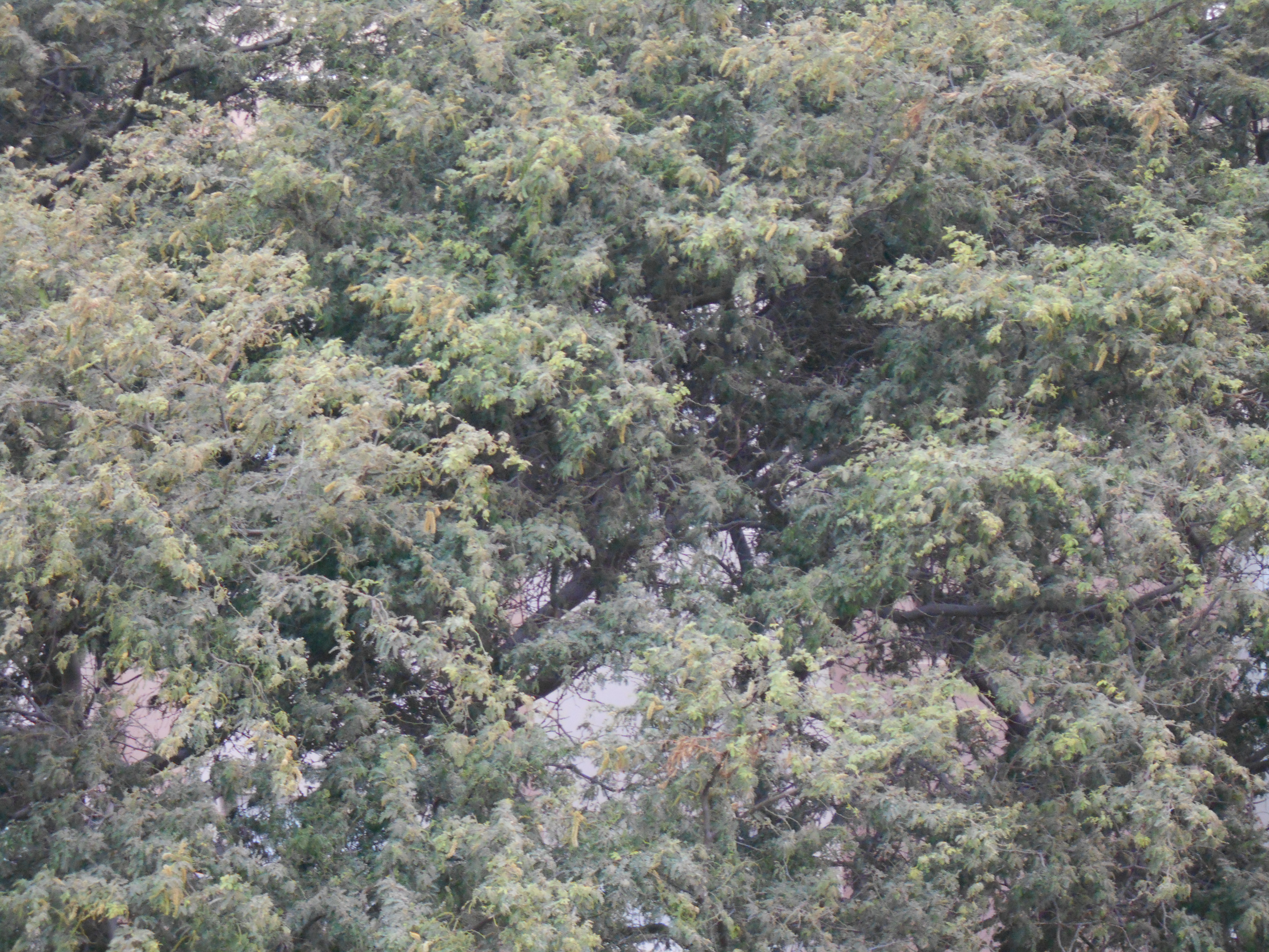 Fogliame di un acacia albida, albero comune a CV.